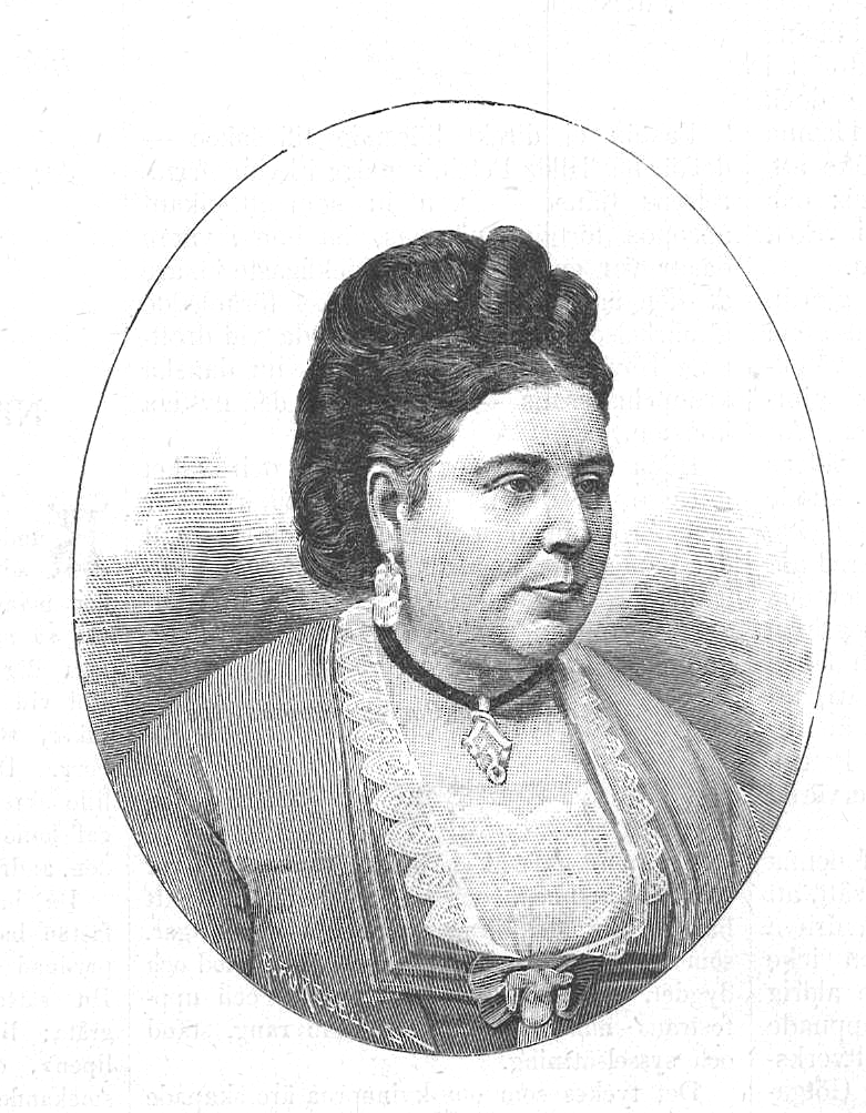 Hilda Petrini